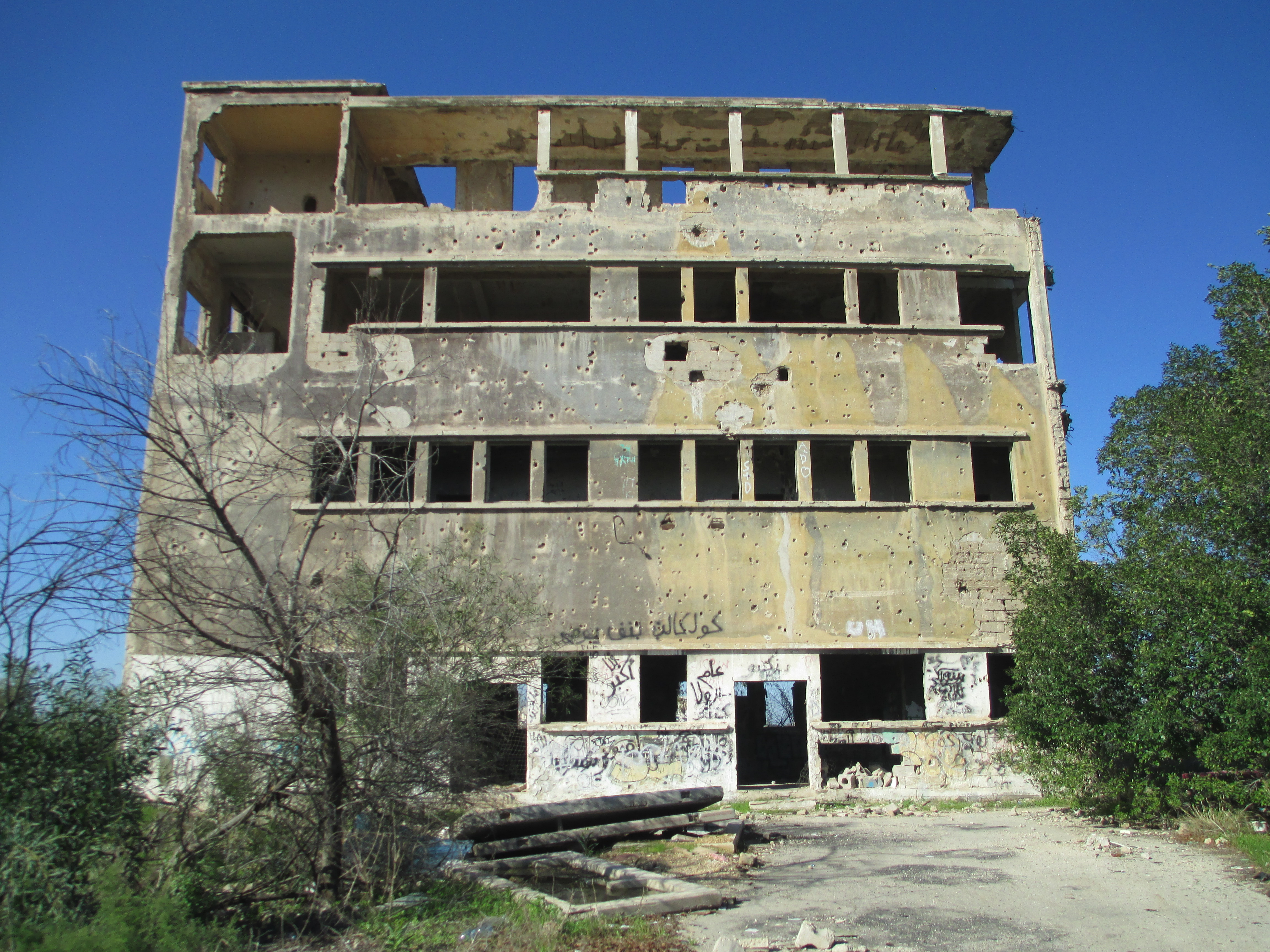 בניין מפקדת חסן סלאמה בבאר יעקב